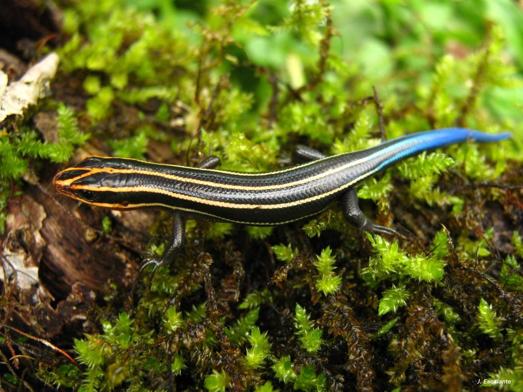 Plestiodon sumichrasti, Veracruz, México